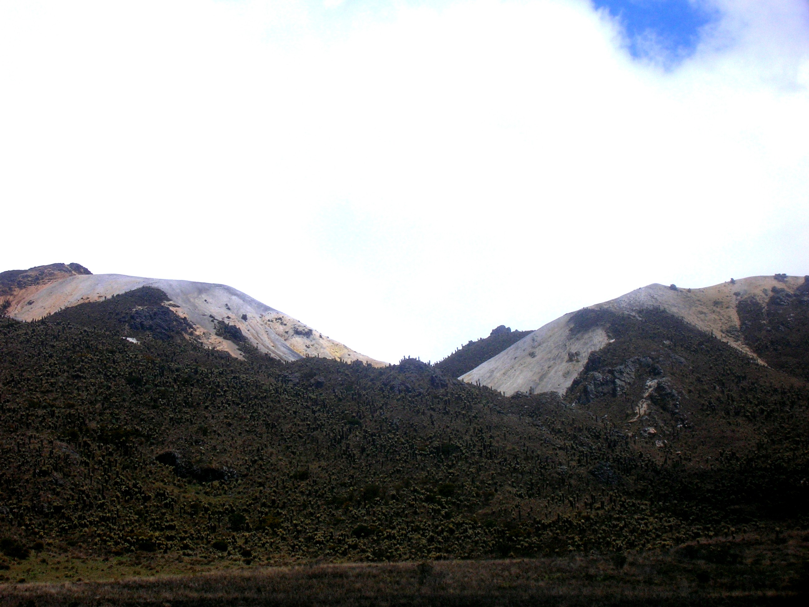 Paramillo de Santa Rosa - Vista de oriente hacia occidente. Foto tomada desde el Bosque de páramo a 4.000 mts.s.n.m